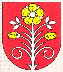 Wappen von Malinová Slowakei